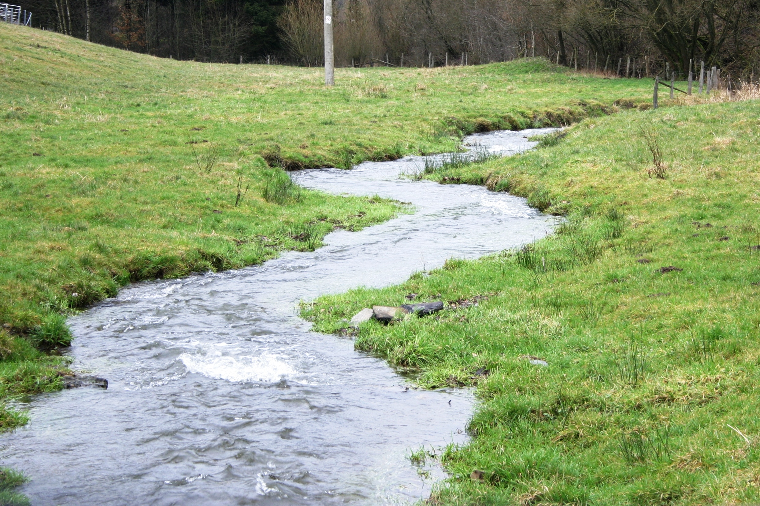 Mühlbach zu Dürler flossaf vun der Duerfbréck.